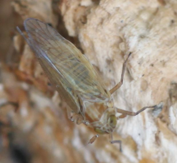 Toya propinqua am 8.7.2017 in der Schwetzinger Hardt